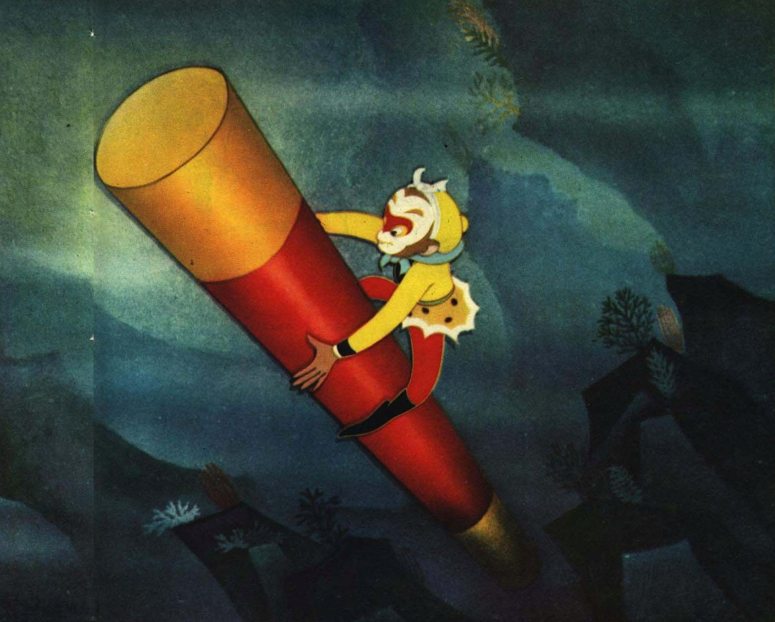 1962-04 1962年 电影 大闹天宫